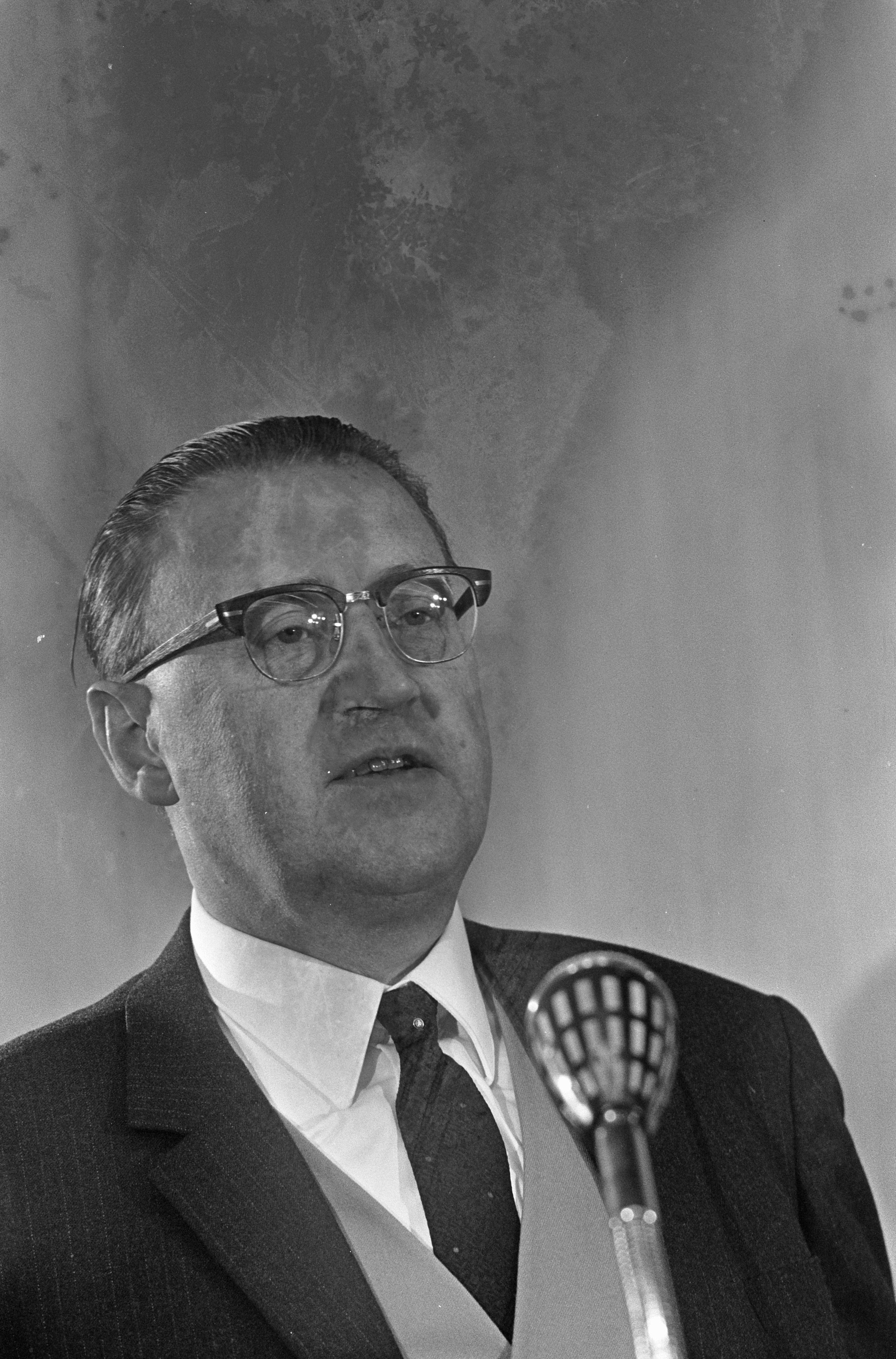 Collectie / Archief : Fotocollectie Anefo Reportage / Serie : [ onbekend ] Beschrijving : Prof. dr. Arie de Froe Datum : 25 september 1966 Trefwoorden : academici, portretten Persoonsnaam : Froe, Arie de Fotograaf : Kroon, Ron / Anefo Auteursrechthebbende : Nationaal Archief Materiaalsoort : Negatief (zwart/wit) Nummer archiefinventaris : bekijk toegang 2.24.01.05 Bestanddeelnummer : 919-5991